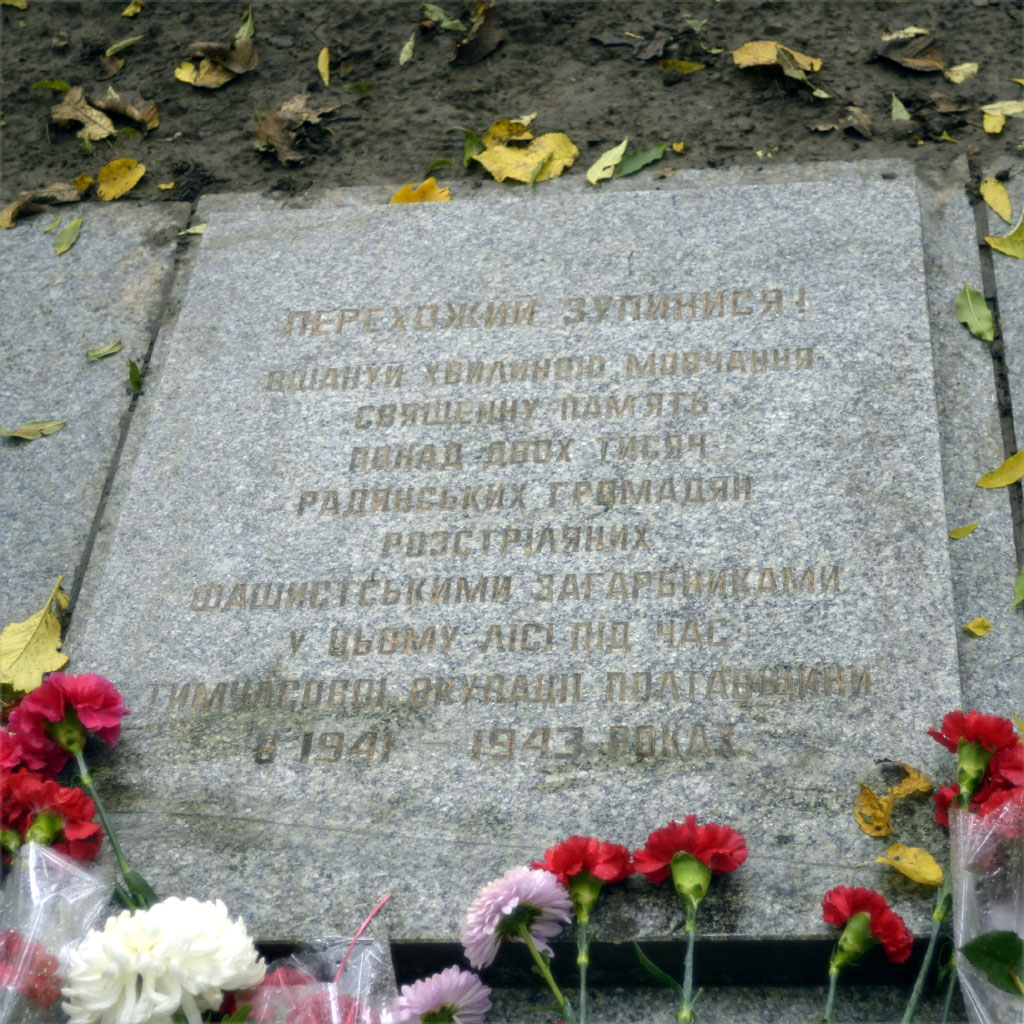 Місце масових розстрілів і три братські могили мирних жителів, військовополонених, 1941–1943 рр., Полтава, Гришкин ліс.